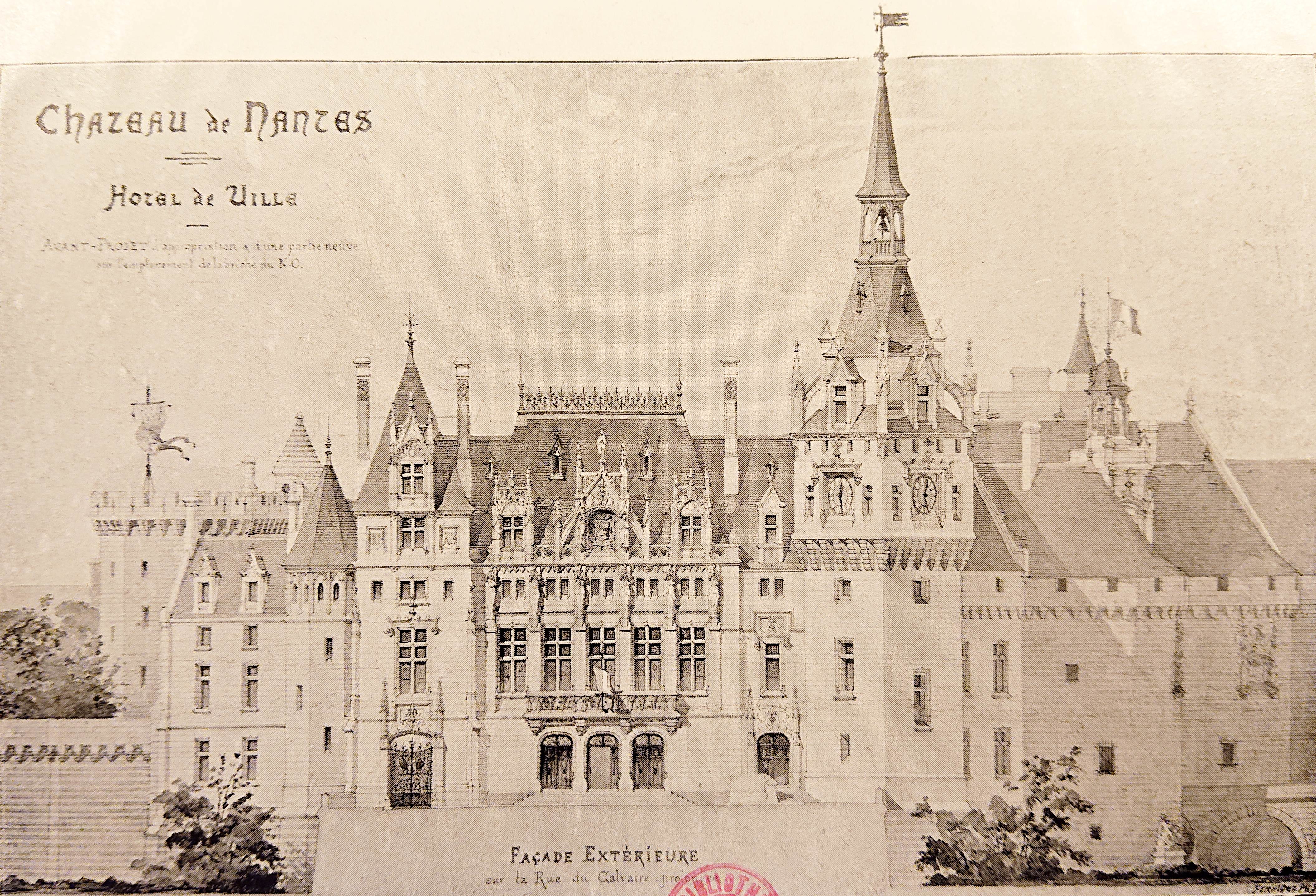 Projet de reconstruction et de restauration du Château des ducs de Bretagne, Nantes.